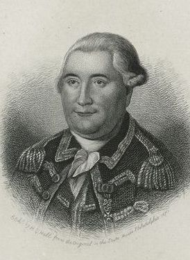 Anne César de la Luzerne (1741-1791)